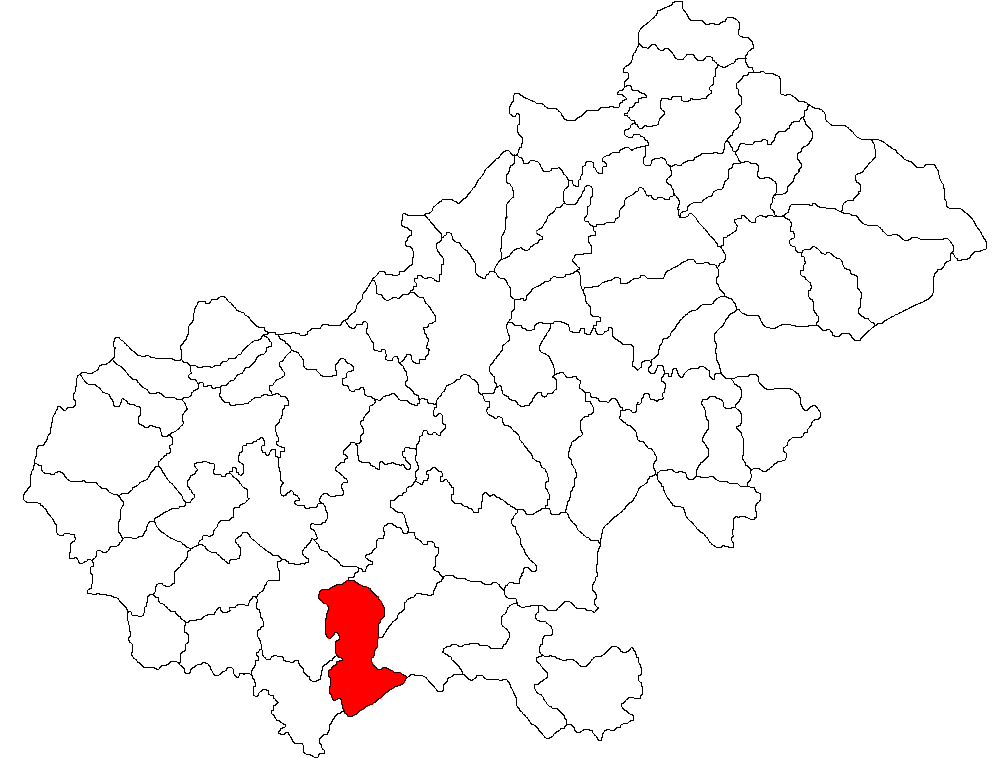 Categorie:Hărţi ale judeţului Satu Mare